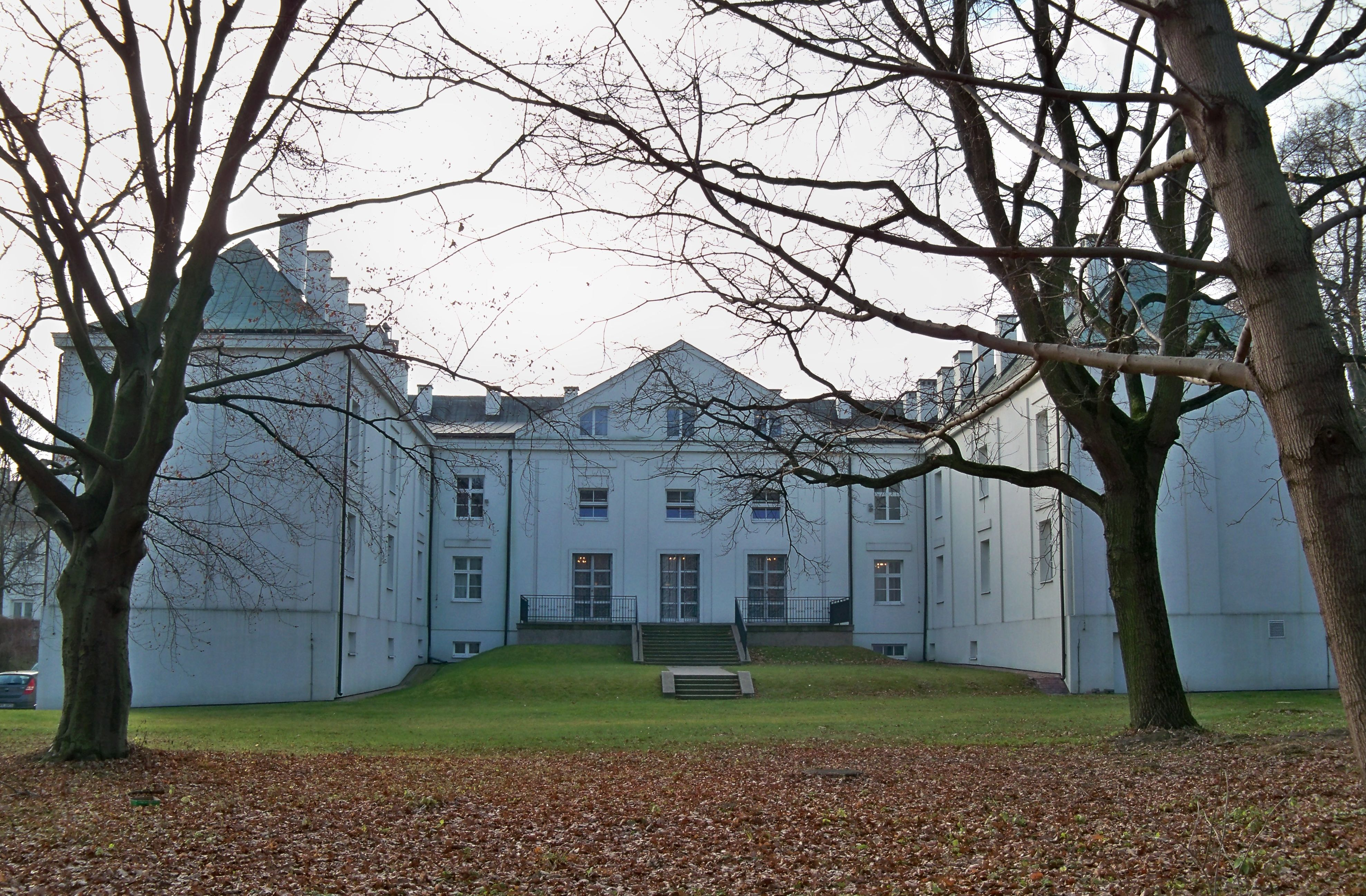 Północna oficyna pałacu w Falentach